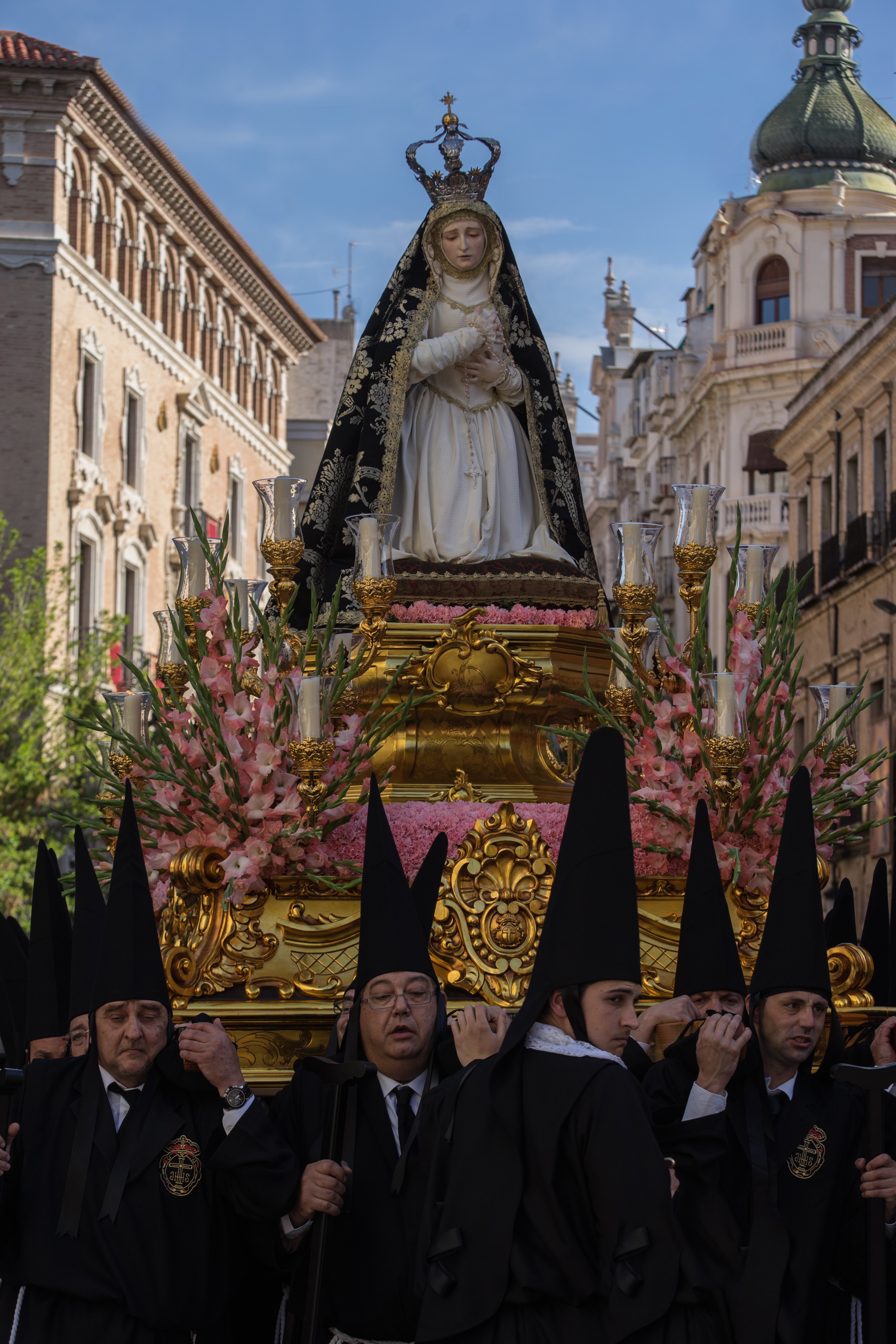 Cofradía de la Caridad. Procesión del Rosario. Nuestra Señora del Rosario. This is a photography of a Folklore festival in Spain (Wikidata id Q5685566).